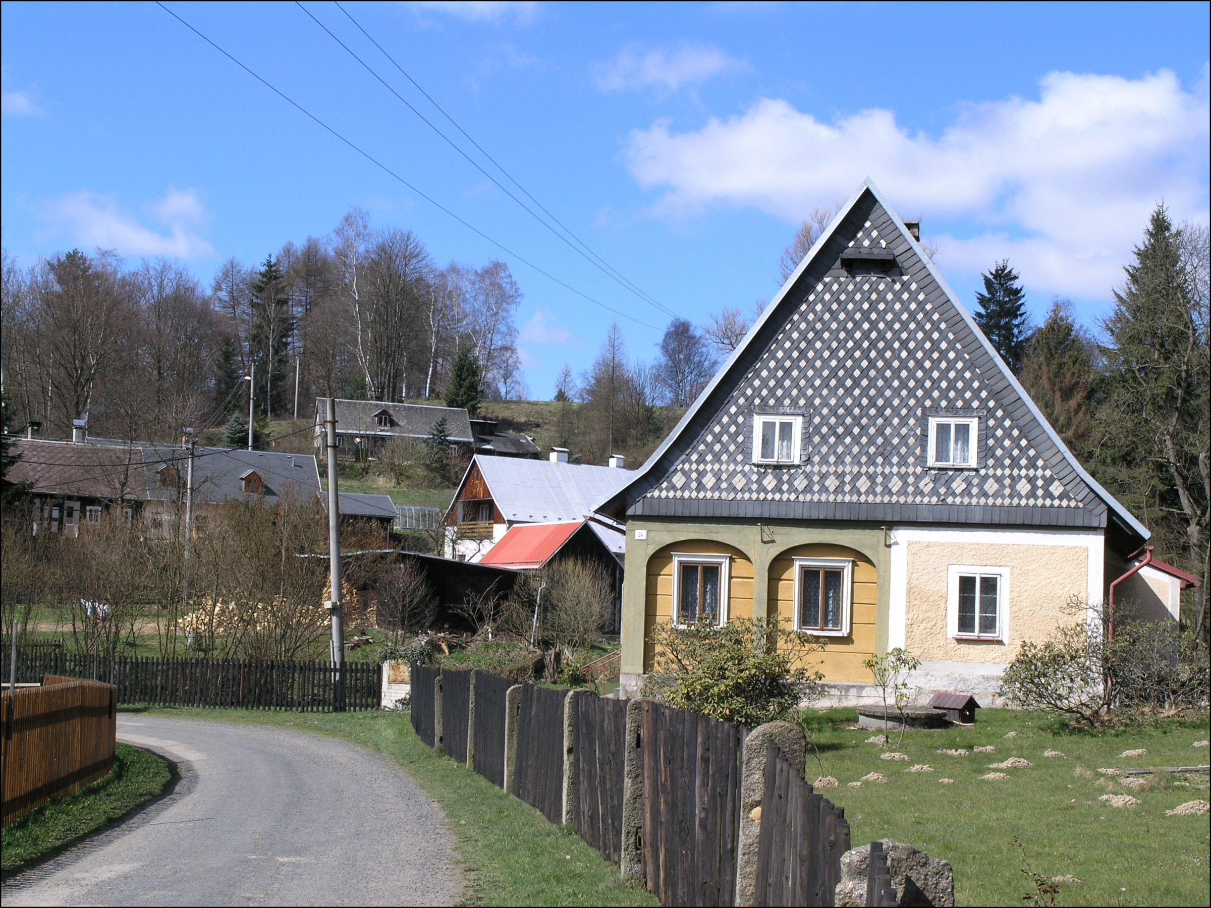 Kopec, čp. 24, v pozadí če. 15, če. 2, čp. 70.